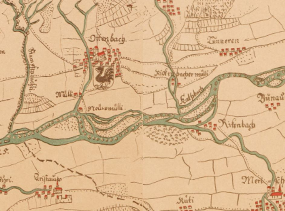 Neumühle an der Reuss Ottenbach ZH: Ausschnitt aus Nachbarblätter 46 und 47 (zusammengesetzt) von Hans Konrad Gyger's Züricher-Cantons-Carte 1667.